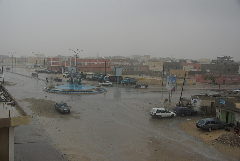 وسط انواذيبو